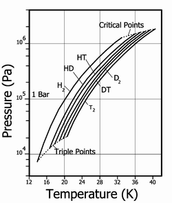 Давление пара над жидким водородом для разных изотопов